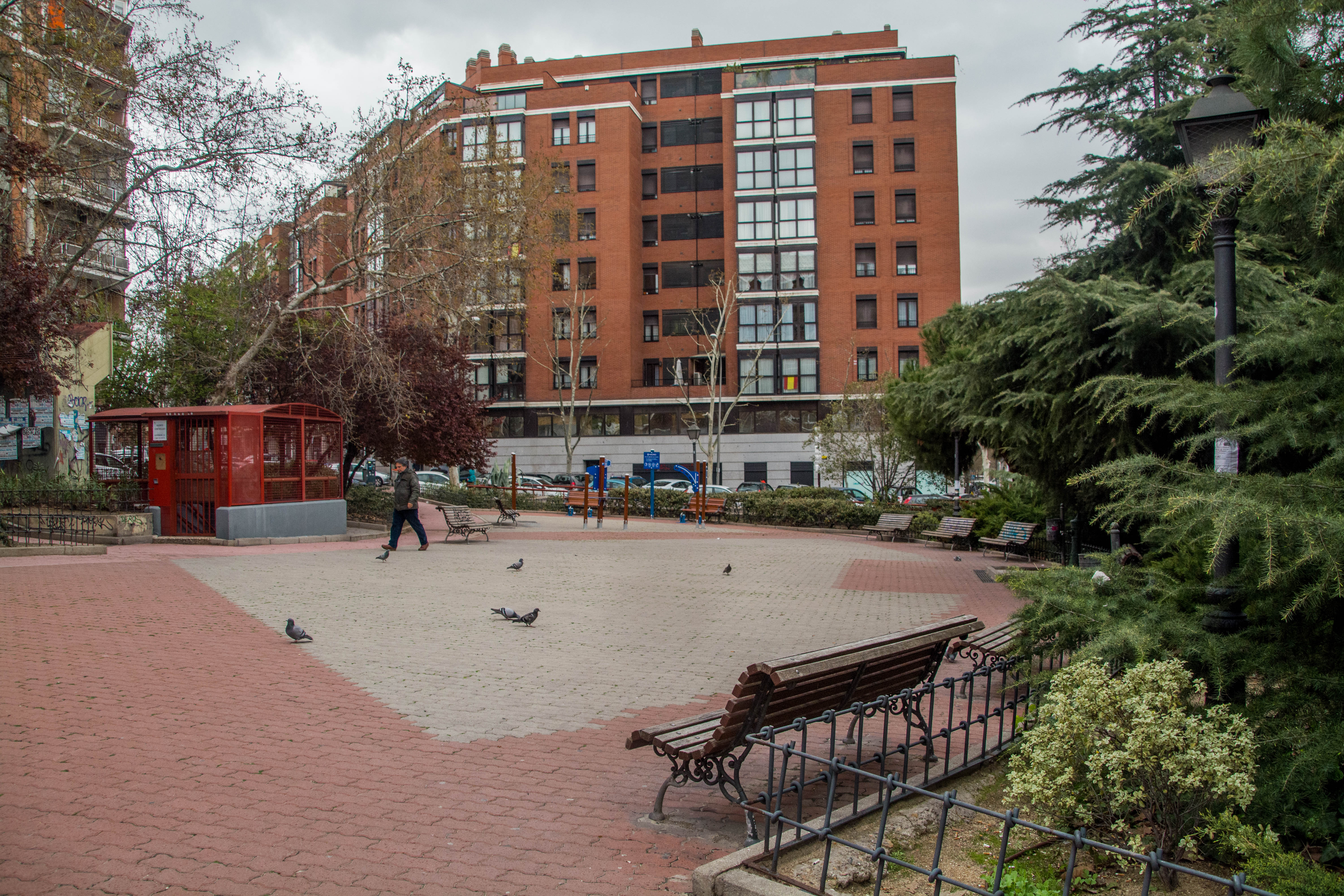 Jardines de Medardo Fraile, Madrid. abril 2018